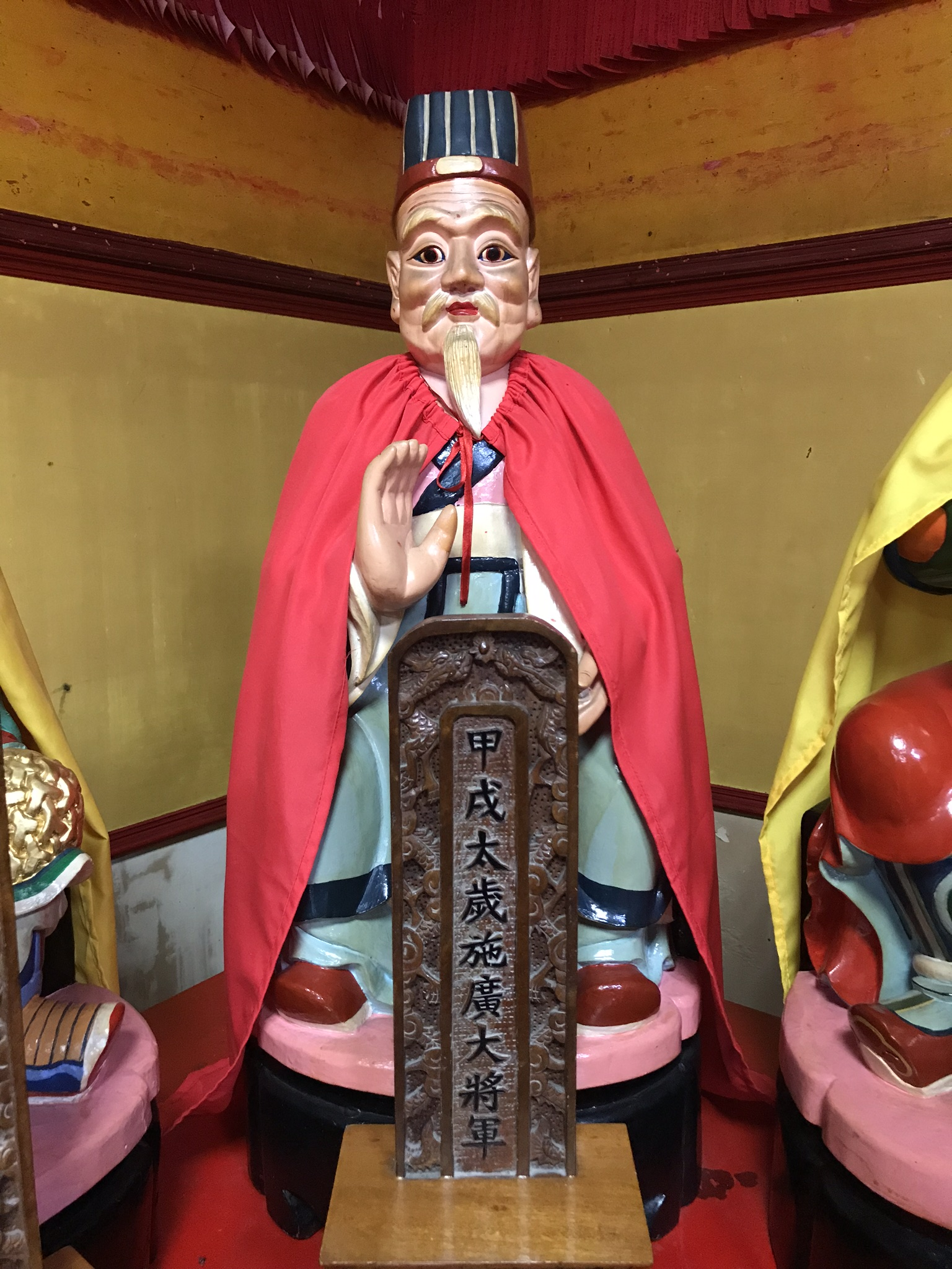 甲戌太歲施廣大將軍神像